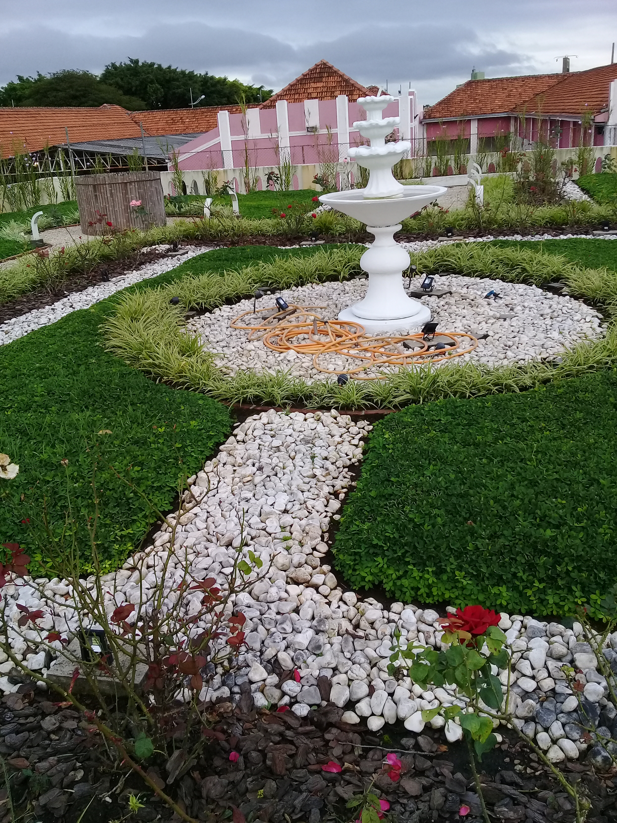 Vista do jardim que fica sobre o reservatório semi-enterrado da Sanepar (Reservatório Botuquara, no centro de Ponta Grossa - Paraná), utilizado antes de existir propriamente as praças públicas